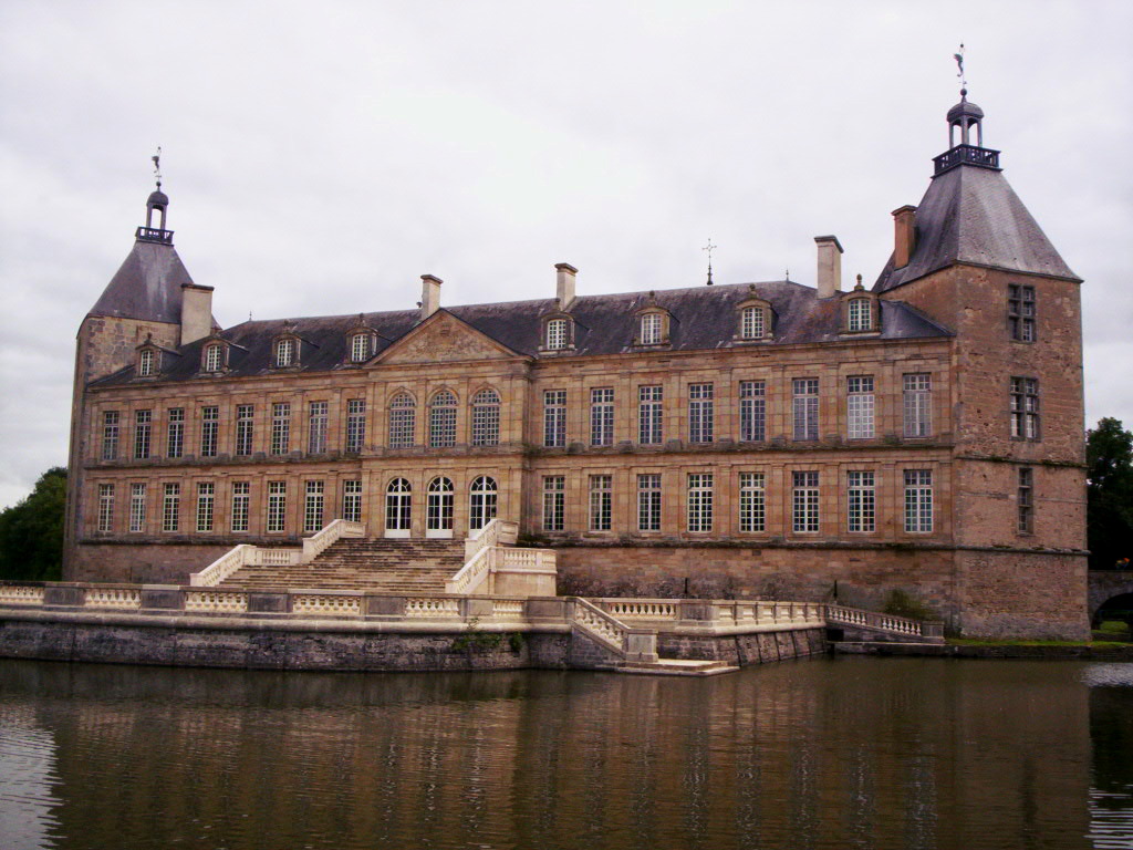 Château de Sully .